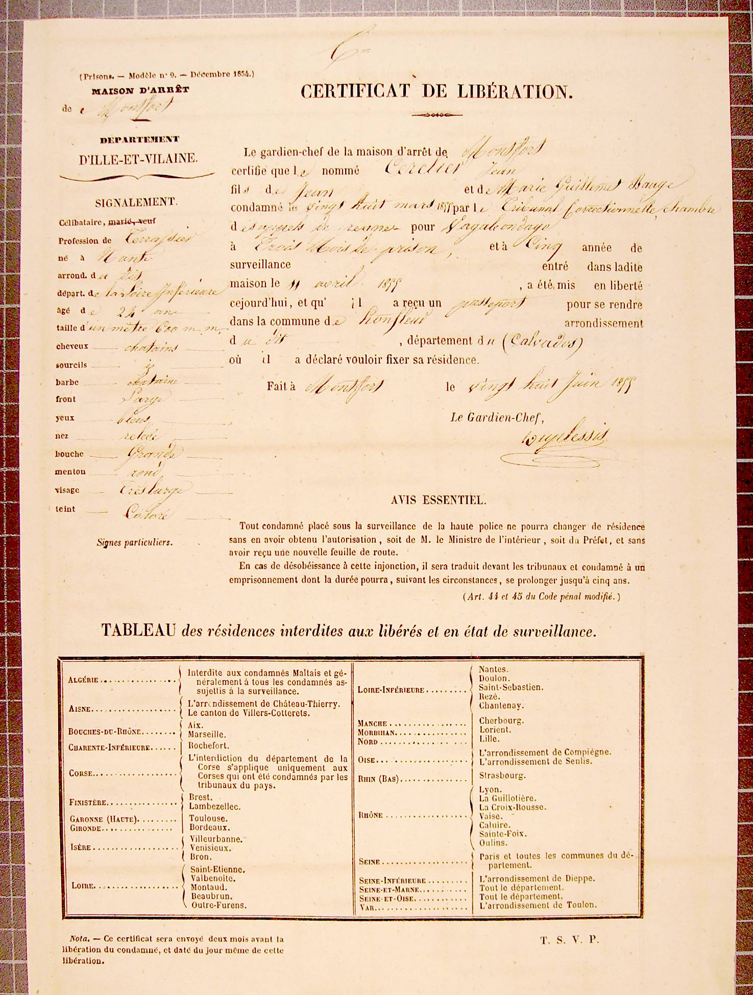 Certificat délivré en France à un détenu à sa sortie de prison une fois sa peine purgée, au XIXe siècle (document de 1855) et devant lui servir de passeport. Le verso comporte la liste de ses condamnations. Le bas du formulaire donne la liste des territoires qui lui sont interdits (en rapport avec sa condamnation). Document provenant des Archives départementales d'Ille-et-Vilaine, série Y.